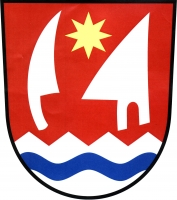 Stavenice, znak. V červeném štítě nad stříbrnou pilovitou patou s modrým vlnitým břevnem přivrácené krojidlo a radlice, obojí stříbrné, vztyčené. Mezi nimi nahoře zlatá osmihrotá hvězda.